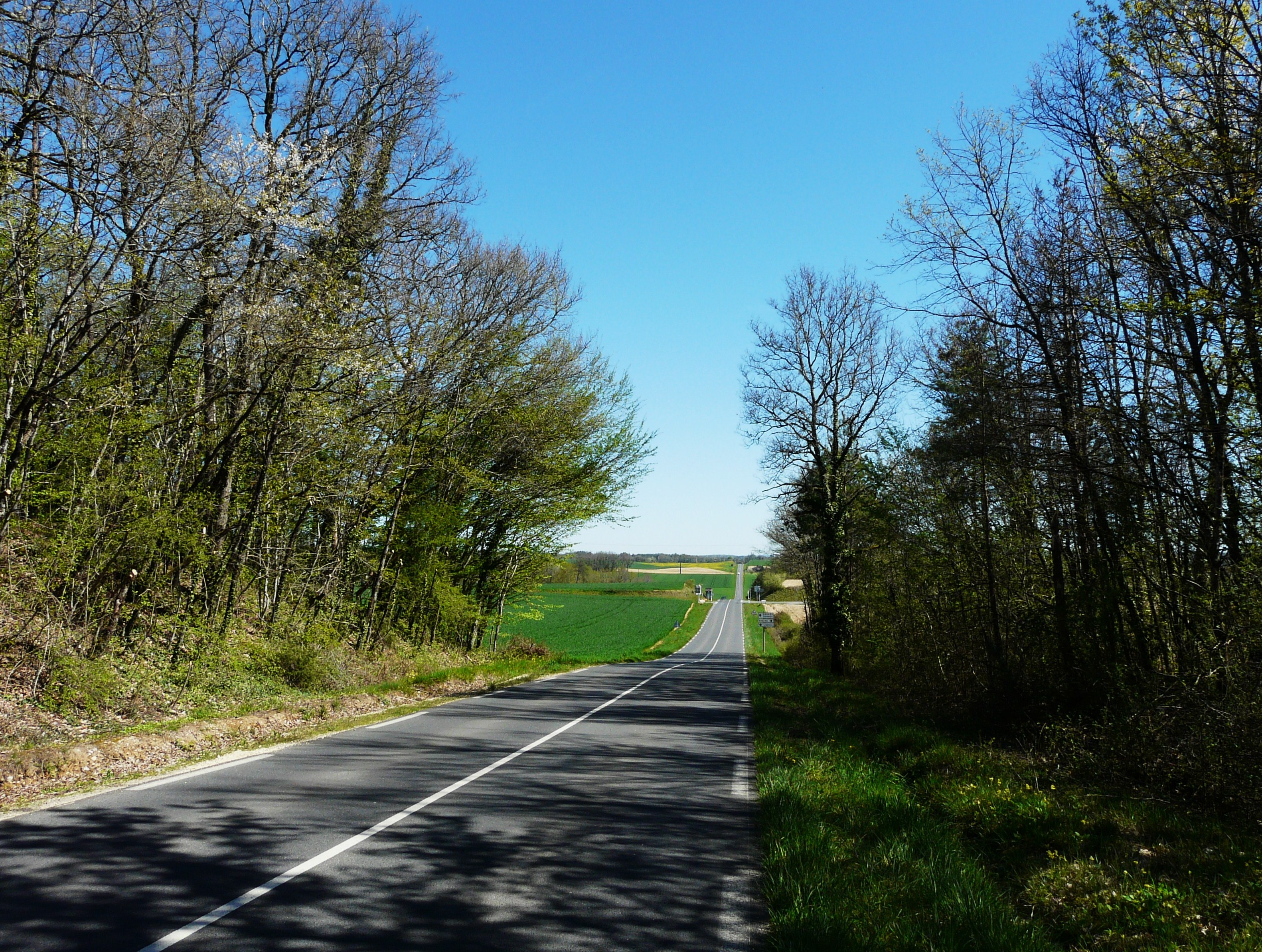 Entre les Potences et les Chabannes, la route départementale 8, rectiligne, suit le tracé d'une ancienne voie romaine ; Sorges, Dordogne, France.